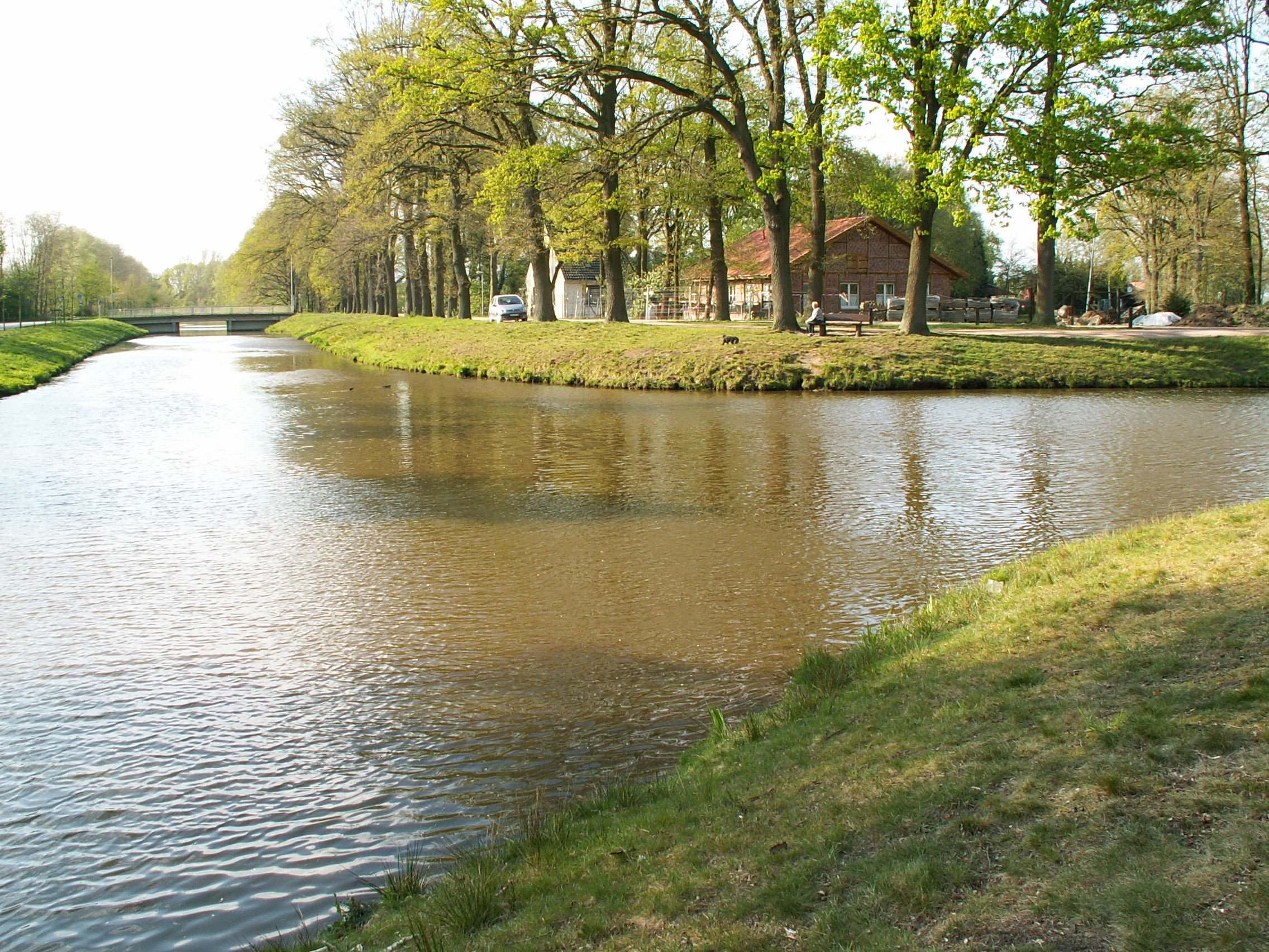 Ems-Vechte-Kanal Süd-Nord-Kanal, Nordhorn Linksemsisches Kanalnetz, Blickrichtung Nord